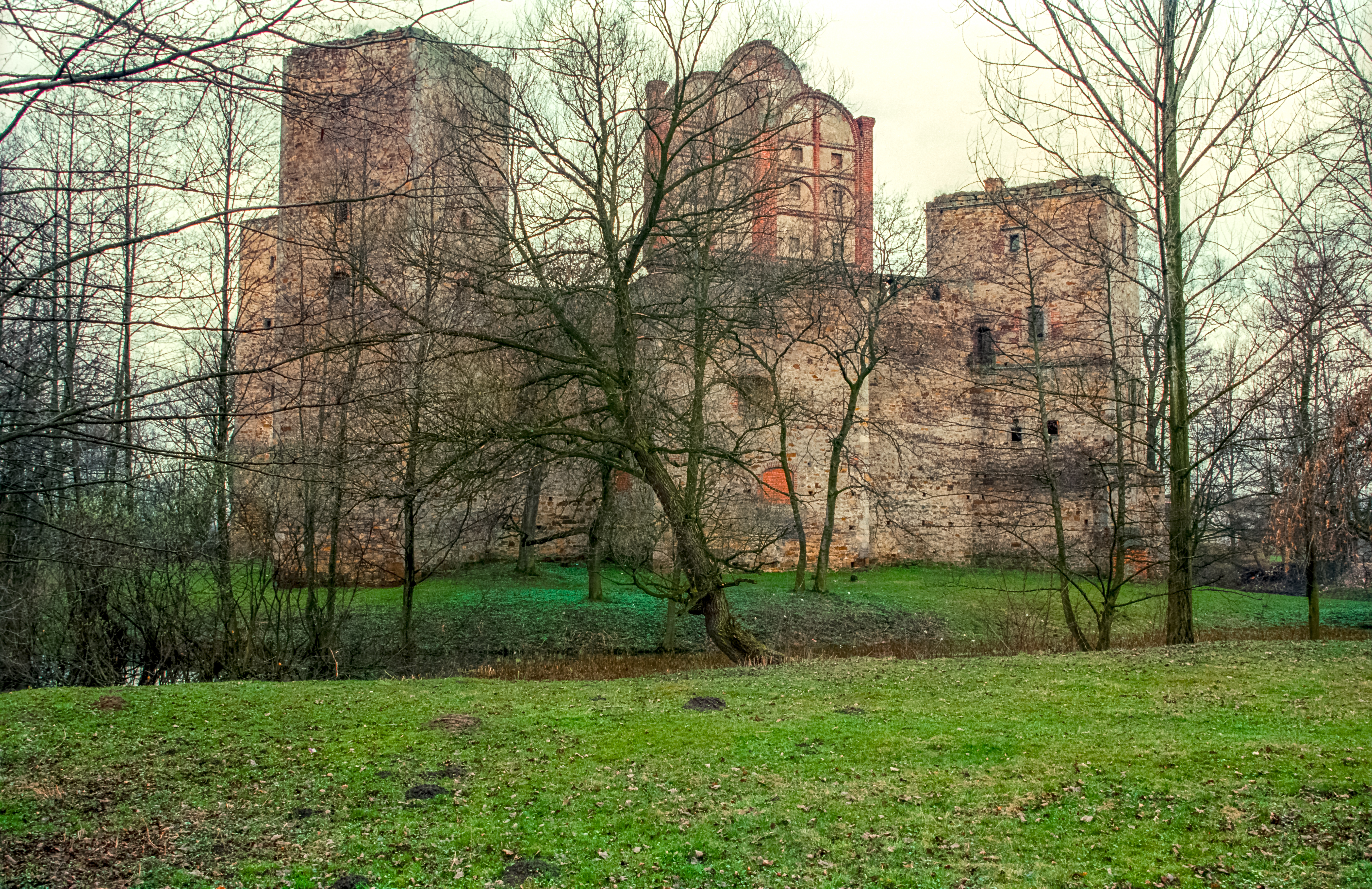 Drzewica